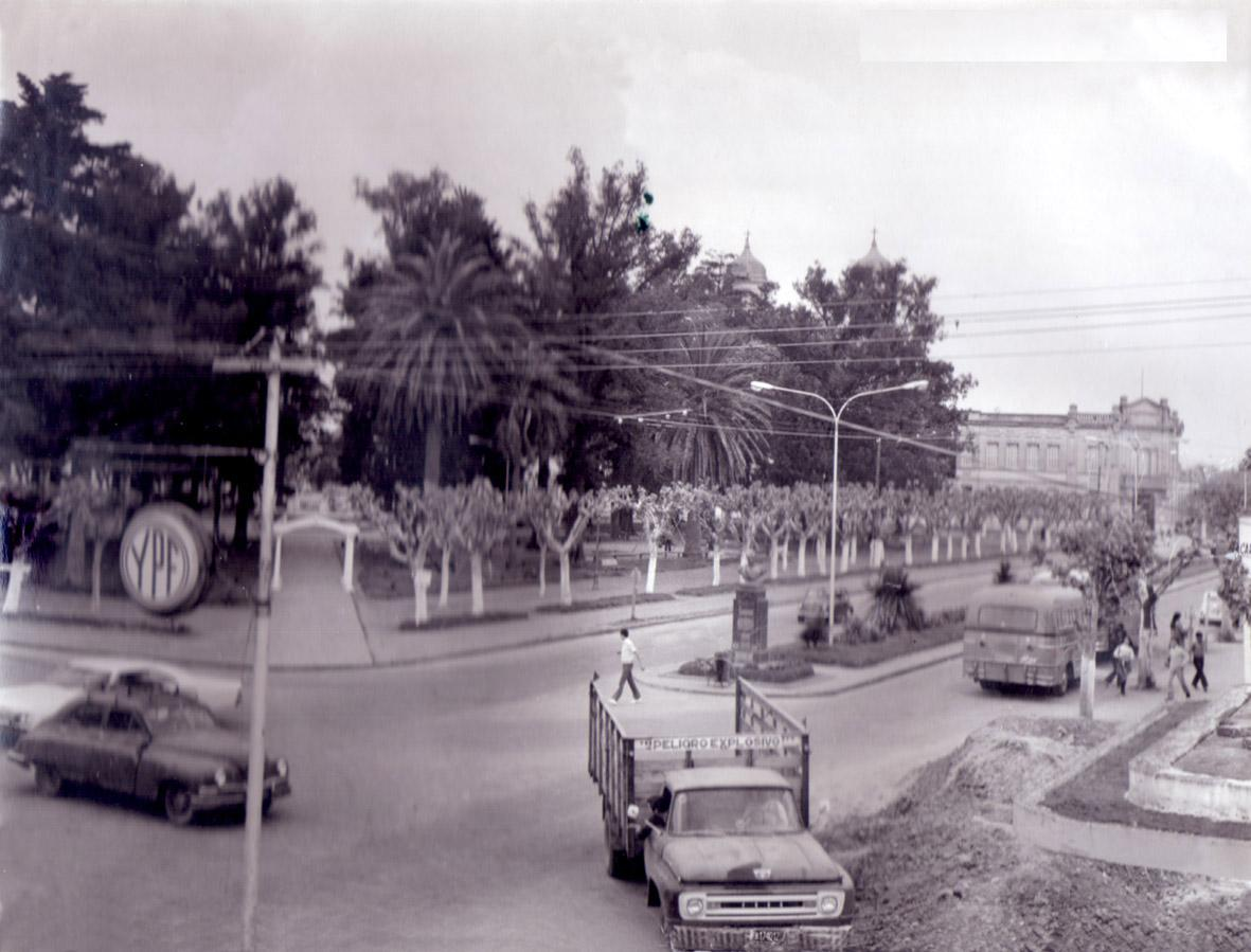 Foto del centro de la Ciudad de San Vicente, Buenos Aires, Argentina. Circa 1976